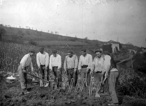 Laialariak, Hernialden.